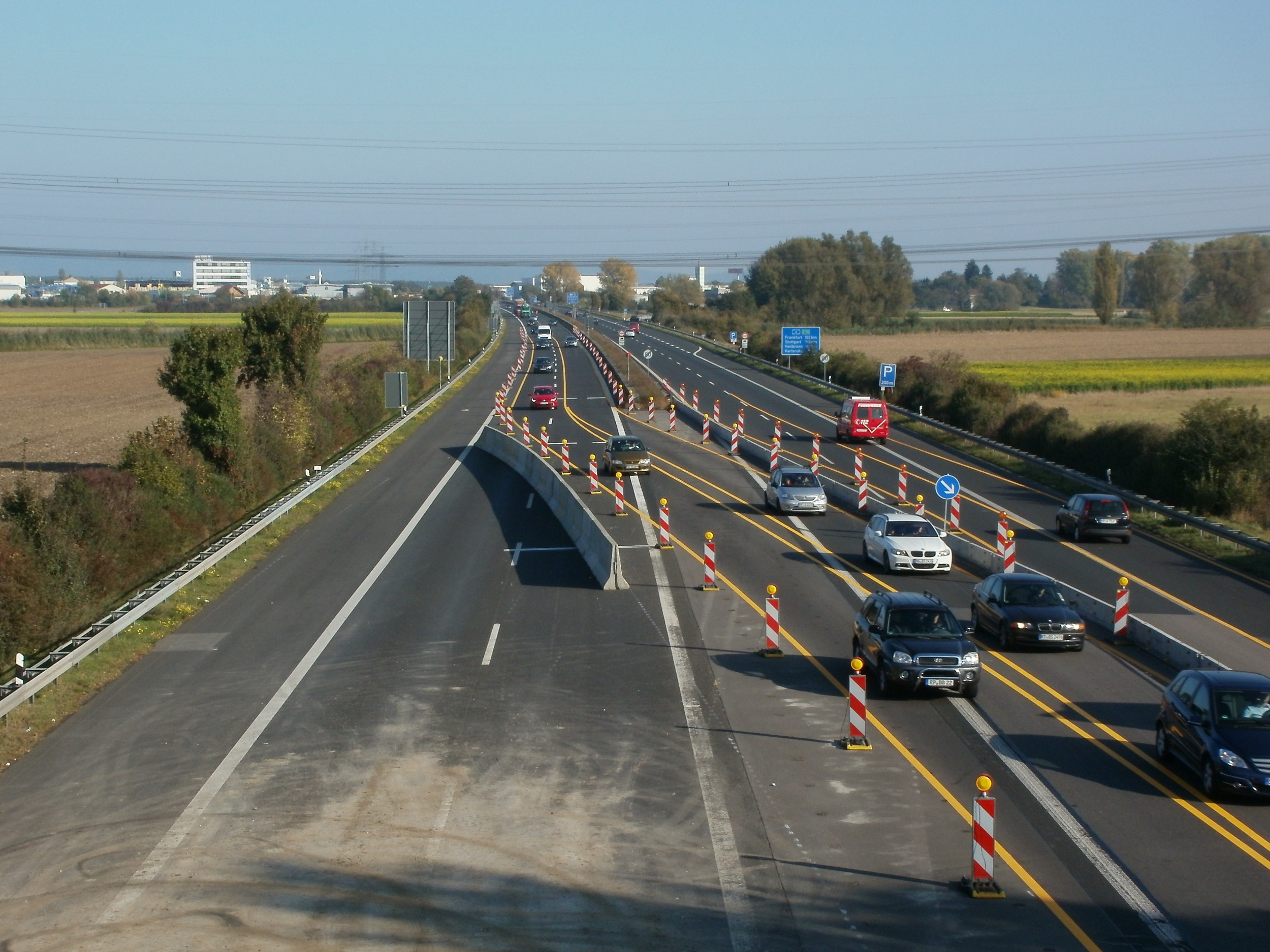 Baustelle an der A61 bei Hockenheim